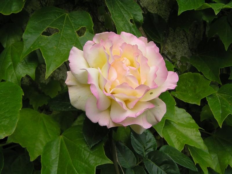 Peace ou mmeMeilland